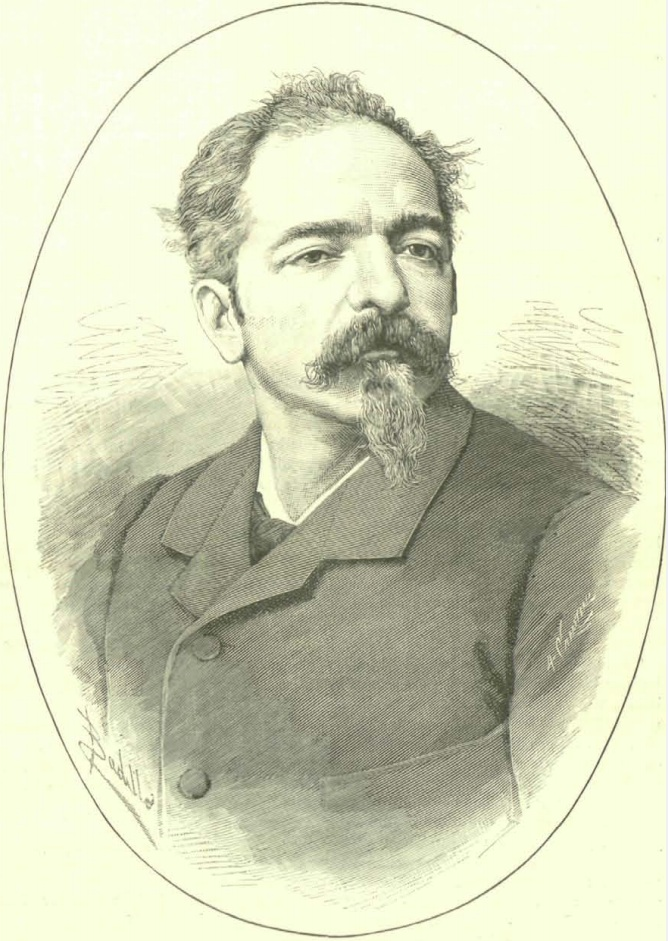 D. Jerónimo Suñol, escultor, nuevo académico.